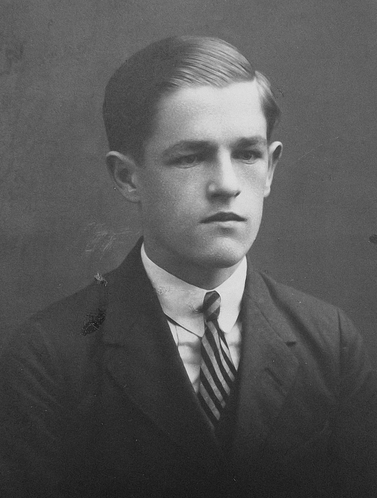 Stanisław Czerniec (fotografia portretowa na świadectwie dojrzałości z 1928).